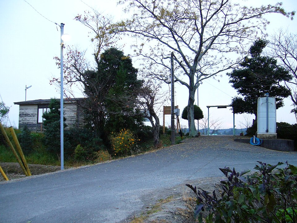 天竜浜名湖鉄道細谷駅